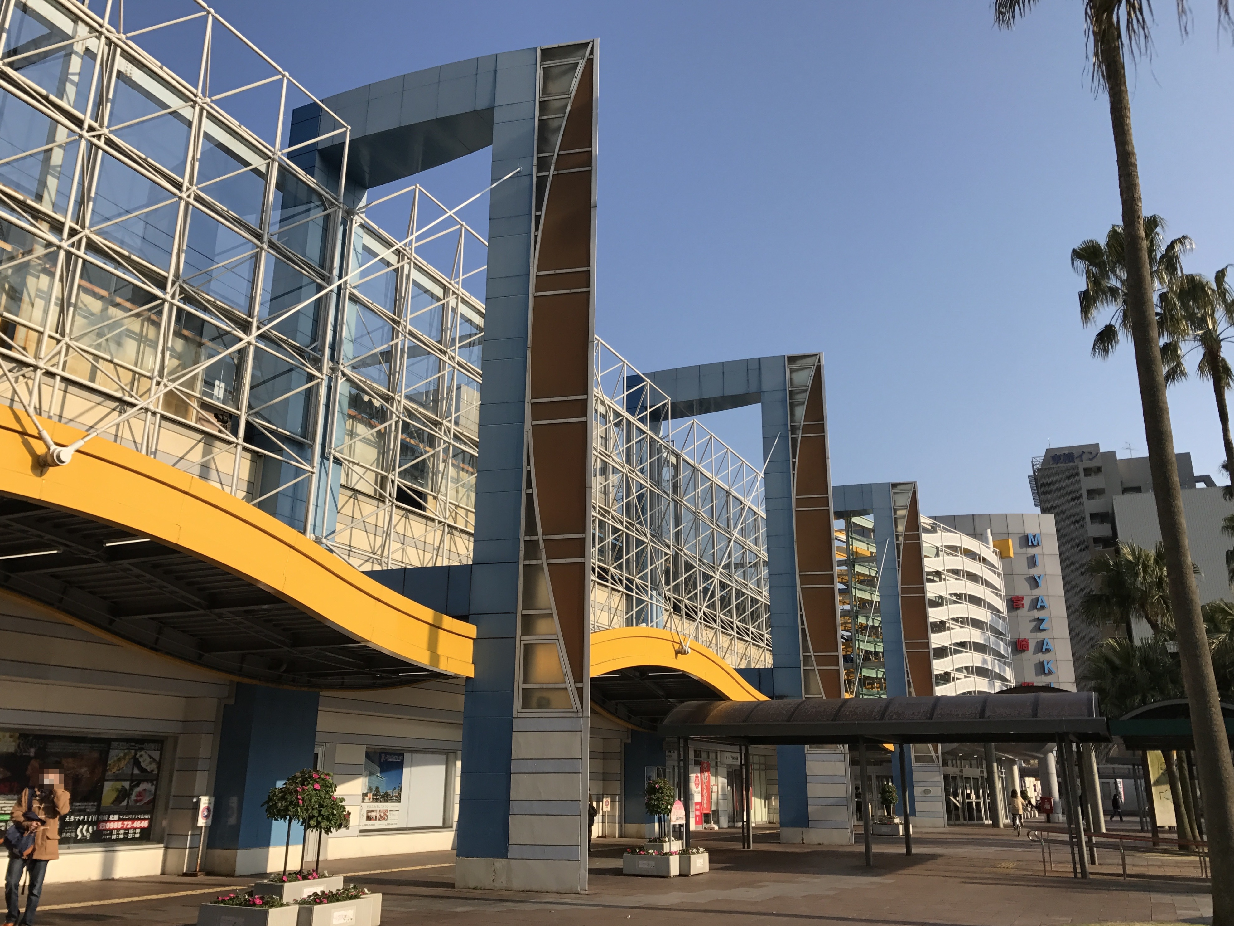 宮崎駅西口